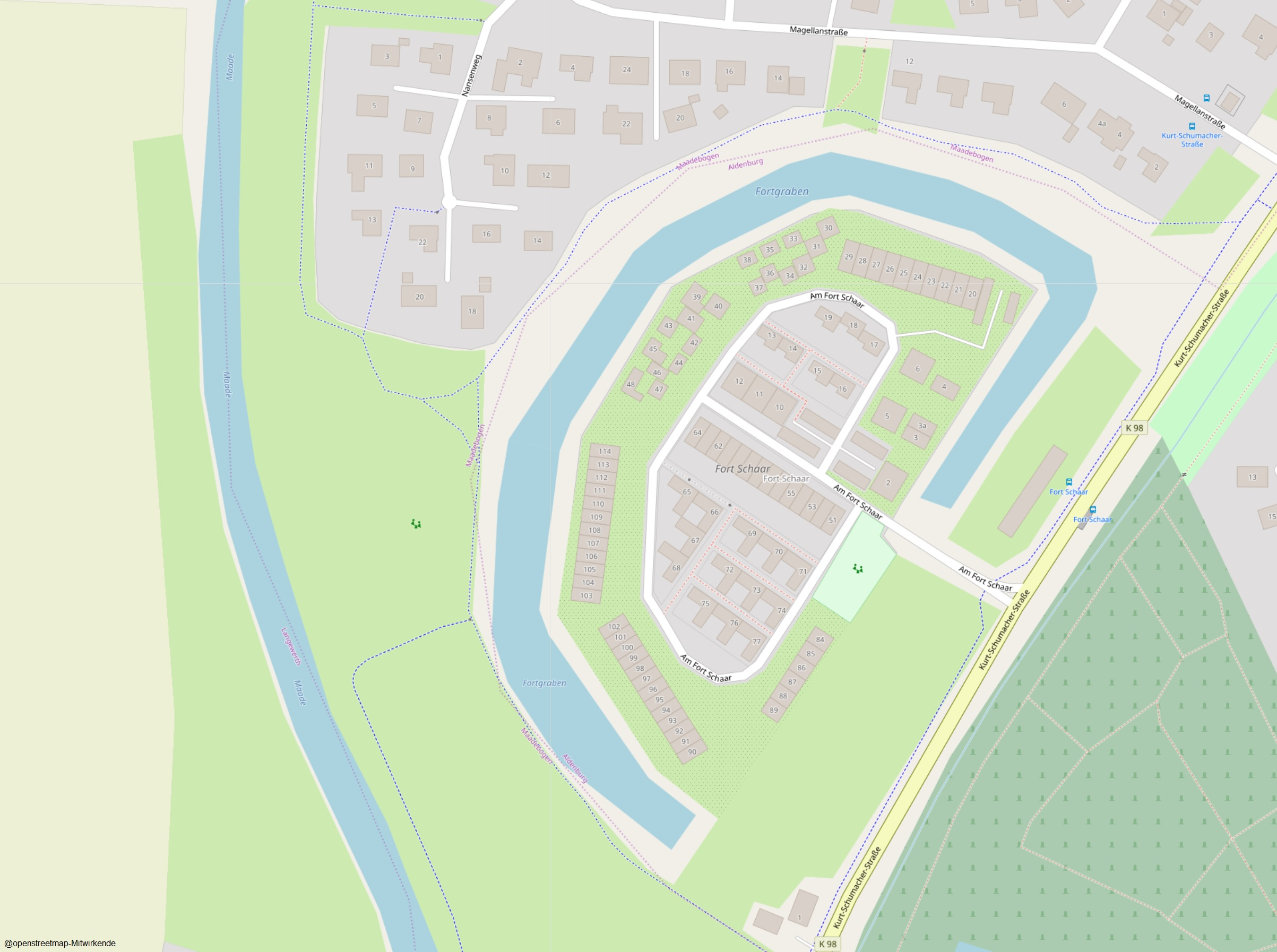 Karte von Fort Schaar Stand 2019